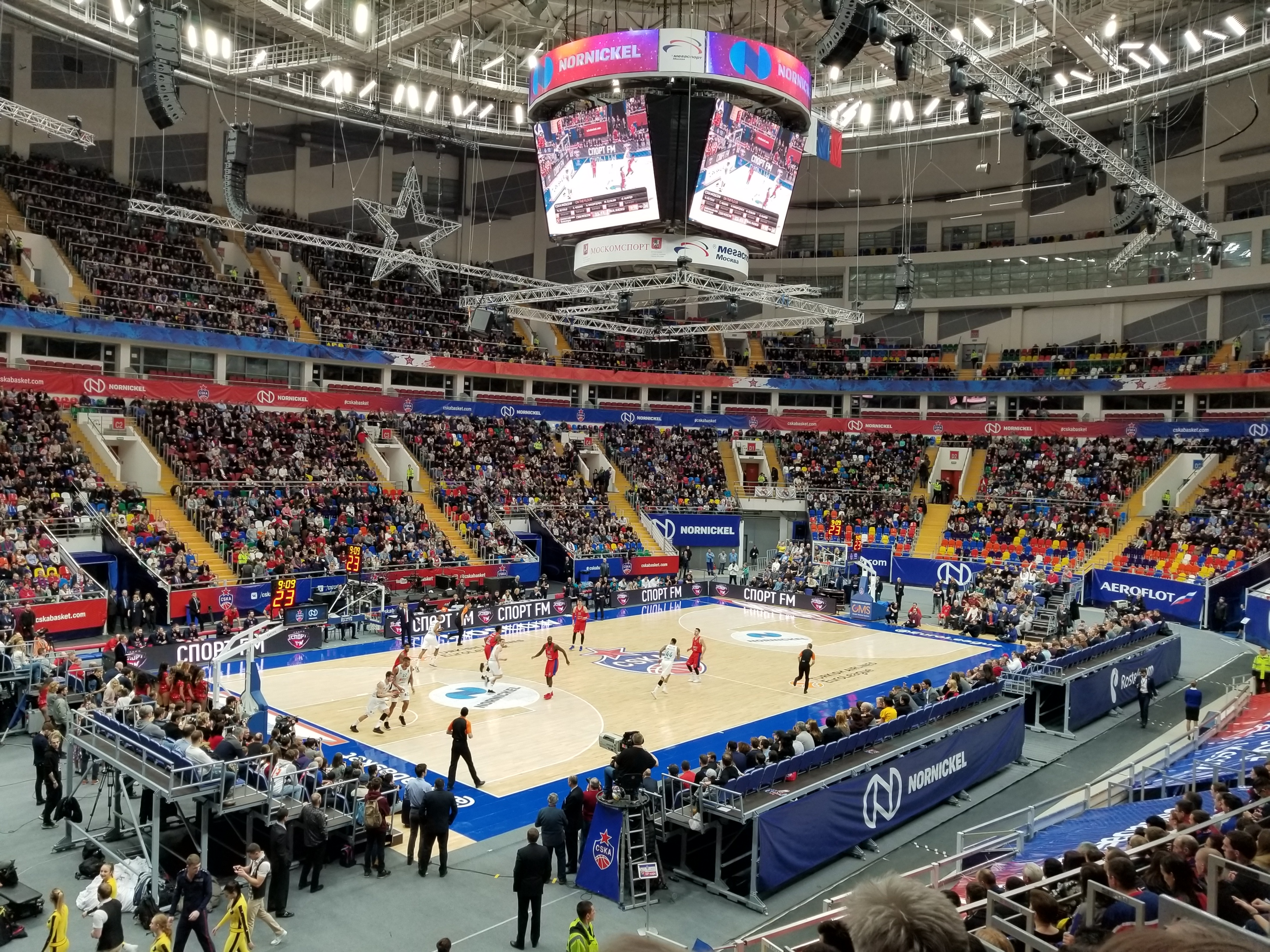 Матч ЦСКА – Реал Мадрид в ДС «Мегаспорт» 1 февраля 2018 года